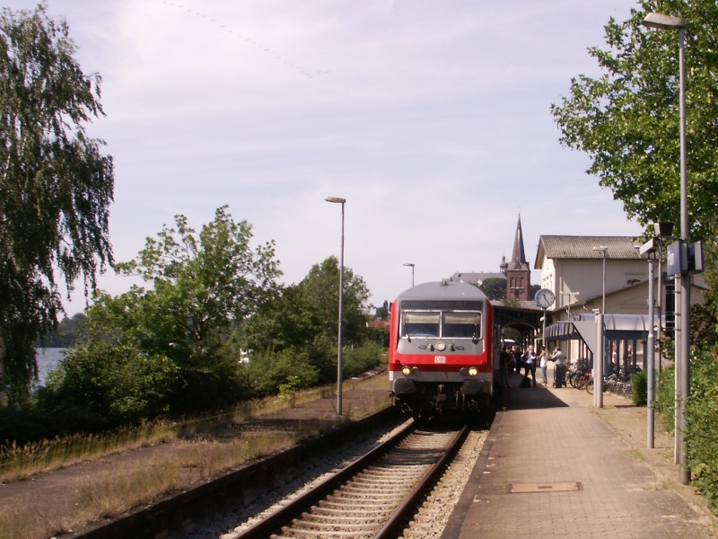 Regionalzug, angeführt von einem Steuerwagen der Bauart Wittenberge im Bahnhof Plön.